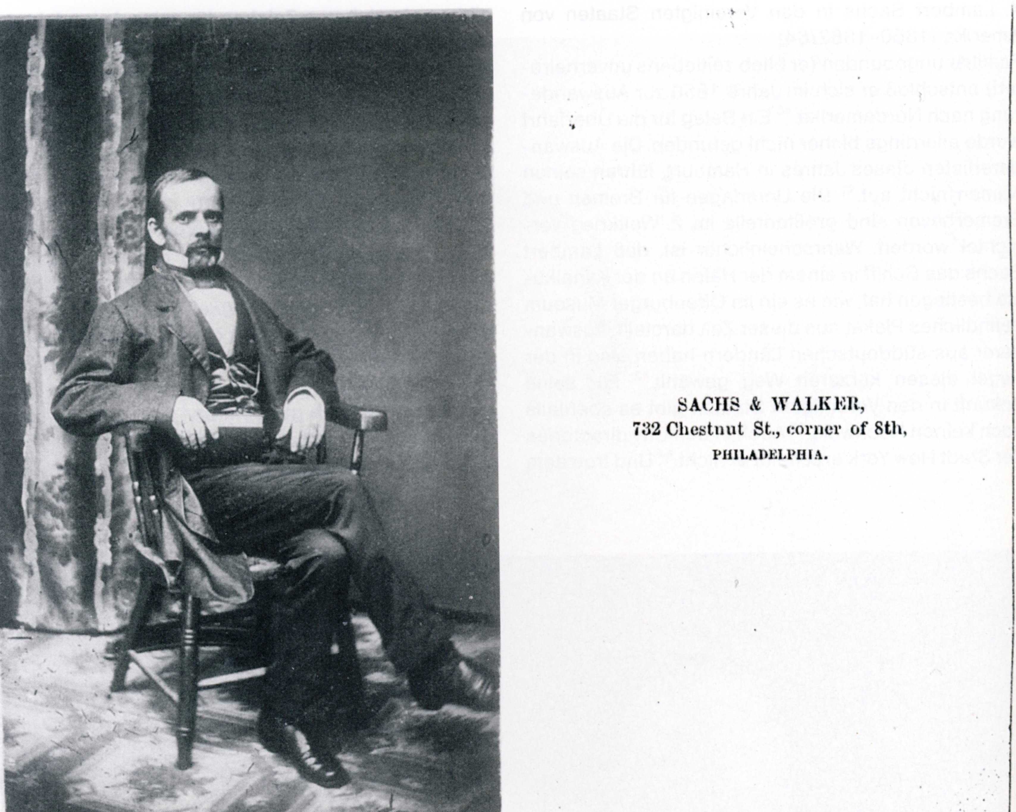 Visitenkarte vermutlich Louis Walker, Geschäftspartner von Lambert Sachs. Vor- und Rückseite, 10,1 x 5,6 cm